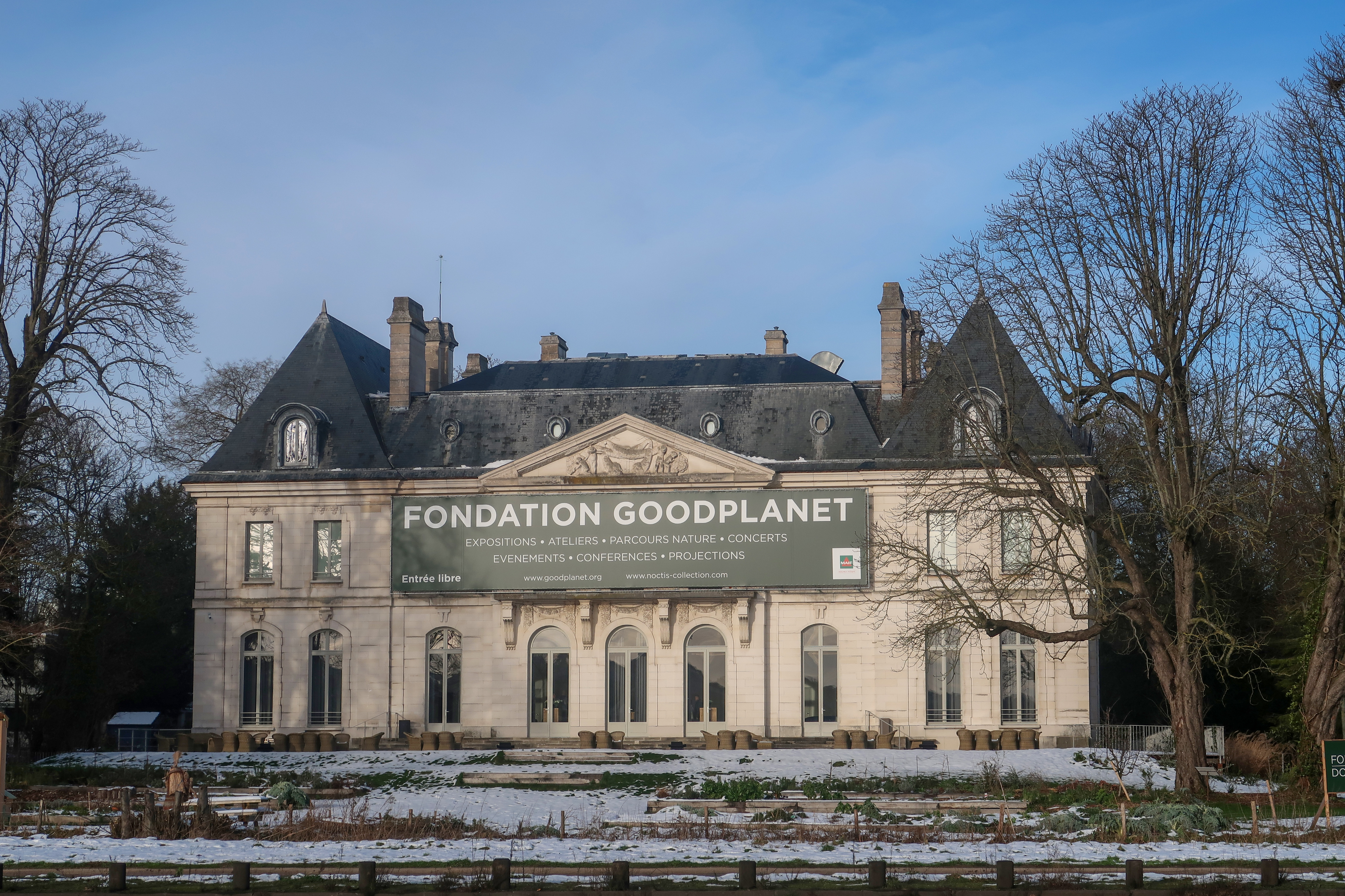 Château de Longchamp, bâtiment de la fondation GoodPlanet (bois de Boulogne, Paris, 16e).